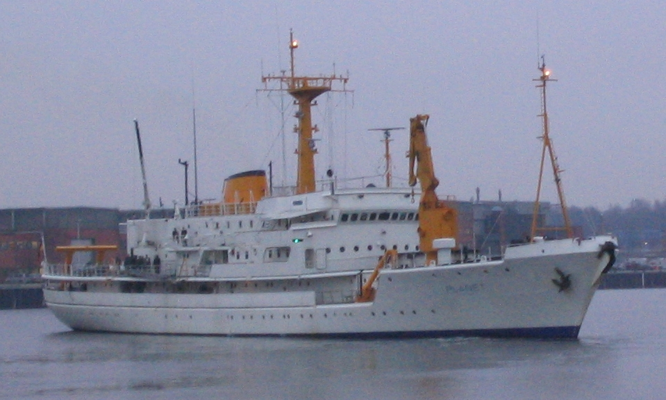 Wehrforschungsschiff "Planet (II)"